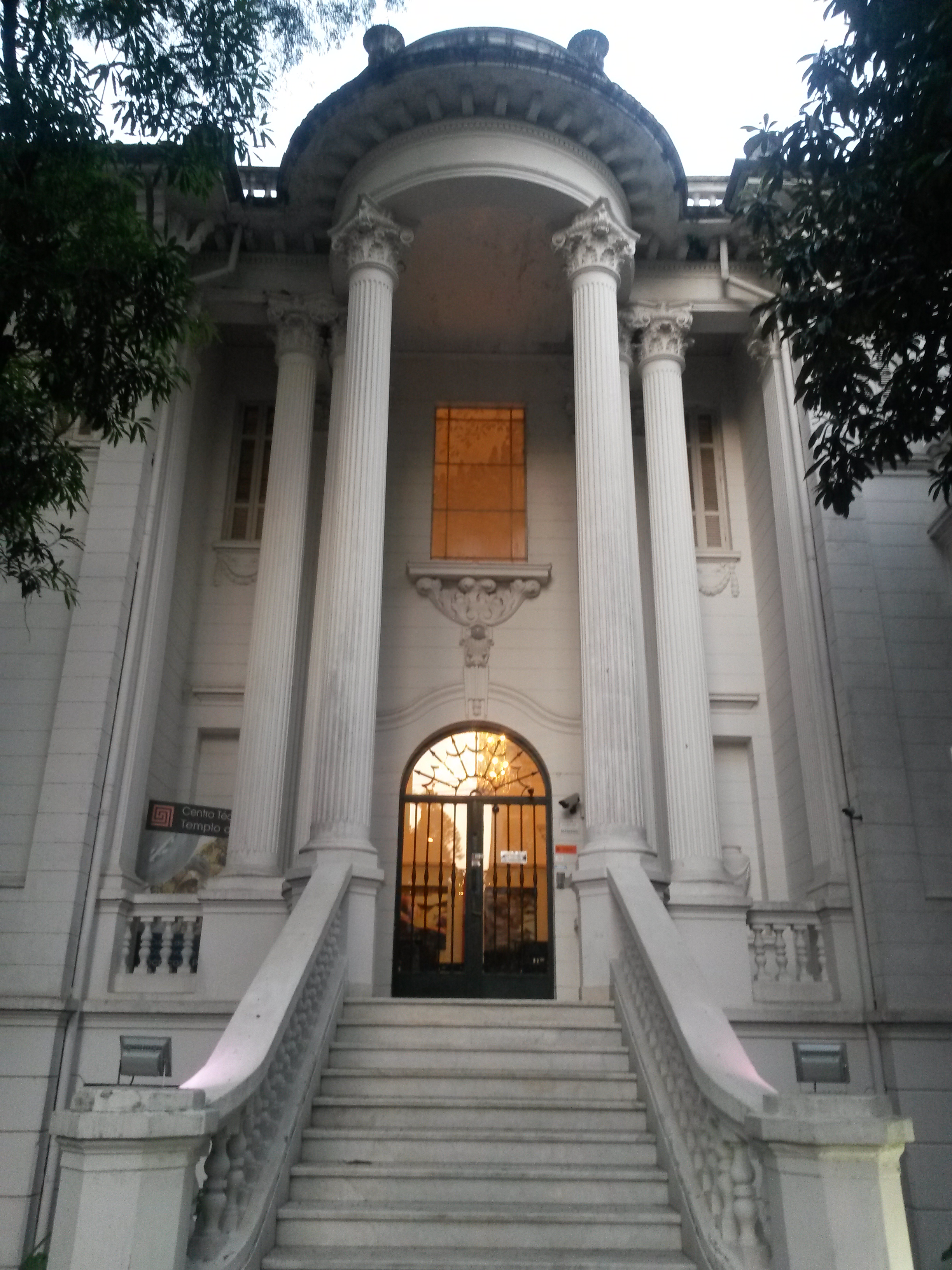 Entrada da Residência da Família Jafet na Rua Costa Aguiar, 1013 em São Paulo (SP), Brasil